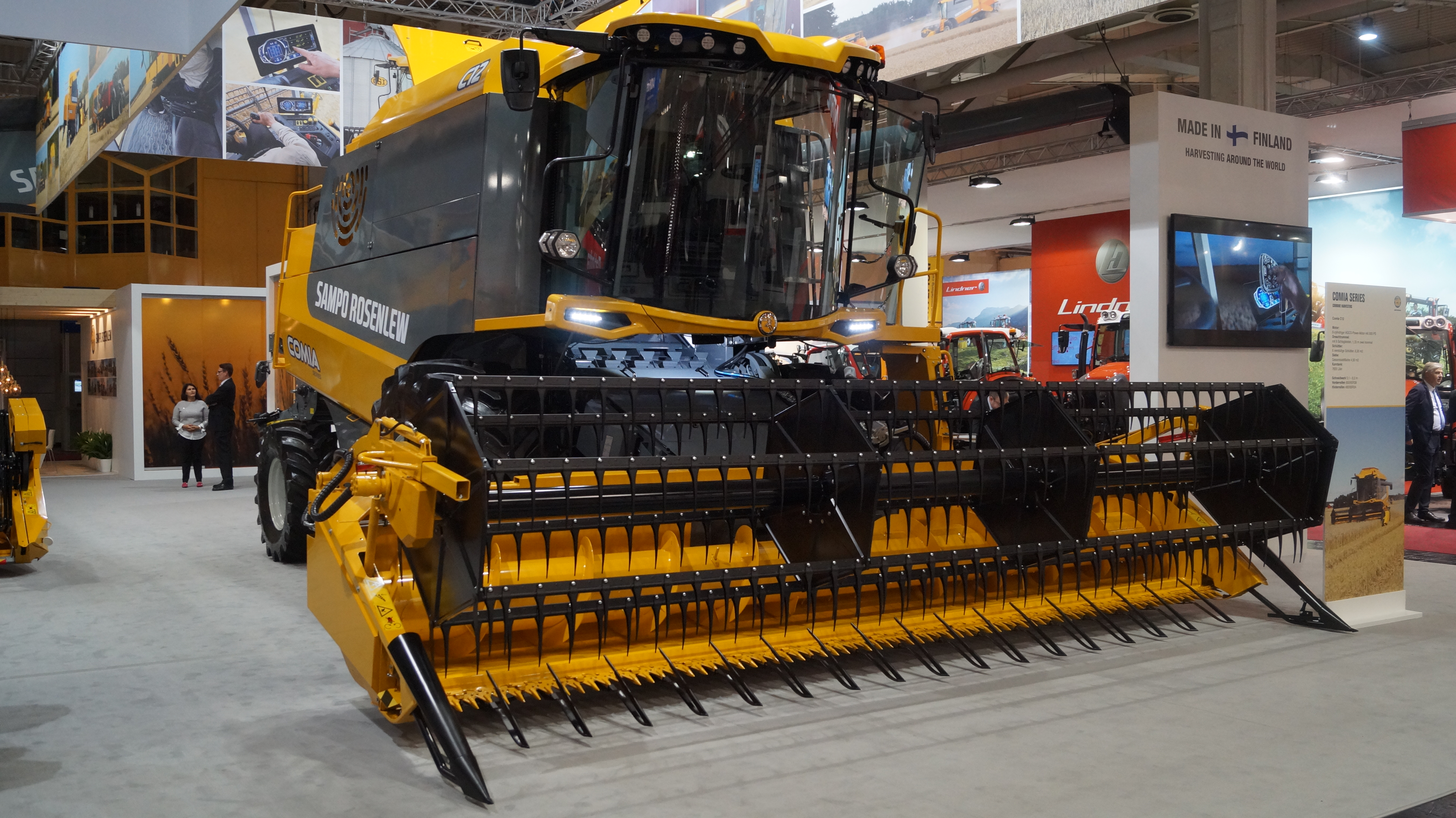 Front- und Seitenansicht eines Sampo Rosenlew Comia C12 der Comia 2.0 Serie, ausgestellt auf der Agritechnica 2017. Auf der Messe wurde die Comia 2.0-Serie erstmals der Öffentlichkeit präsentiert.